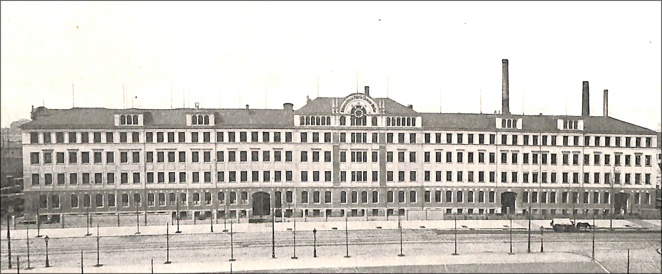 Dresden - Schreibmaschinenfertigung bei der Firma Clemens Müller.